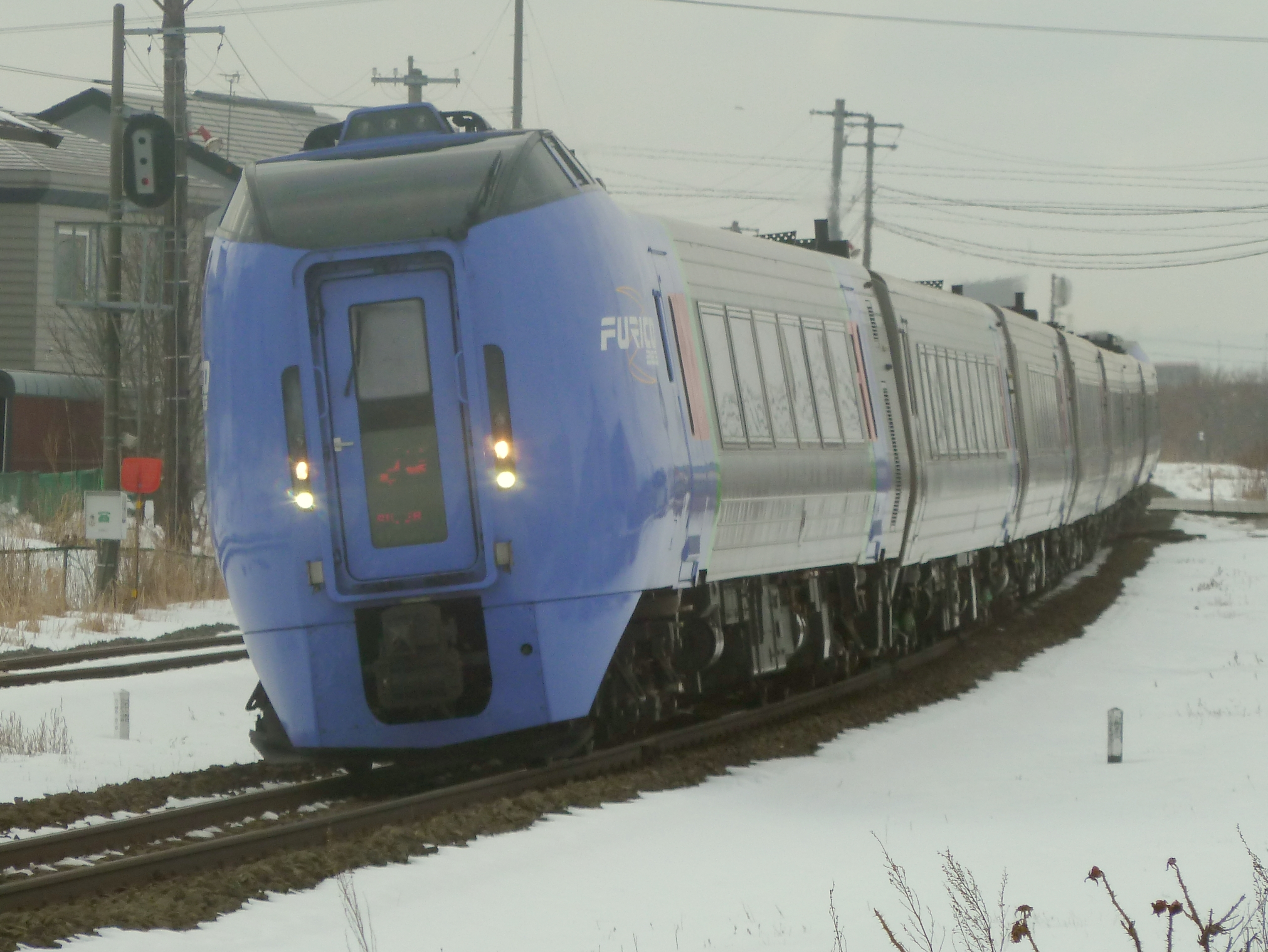 大楽毛駅に進入するキハ283系気動車『スーパーおおぞら』